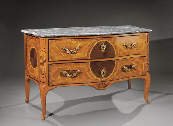 Jean-François HACHE (Français, 1730-1796): Commode galbée sur 3 faces, XVIIIe s.